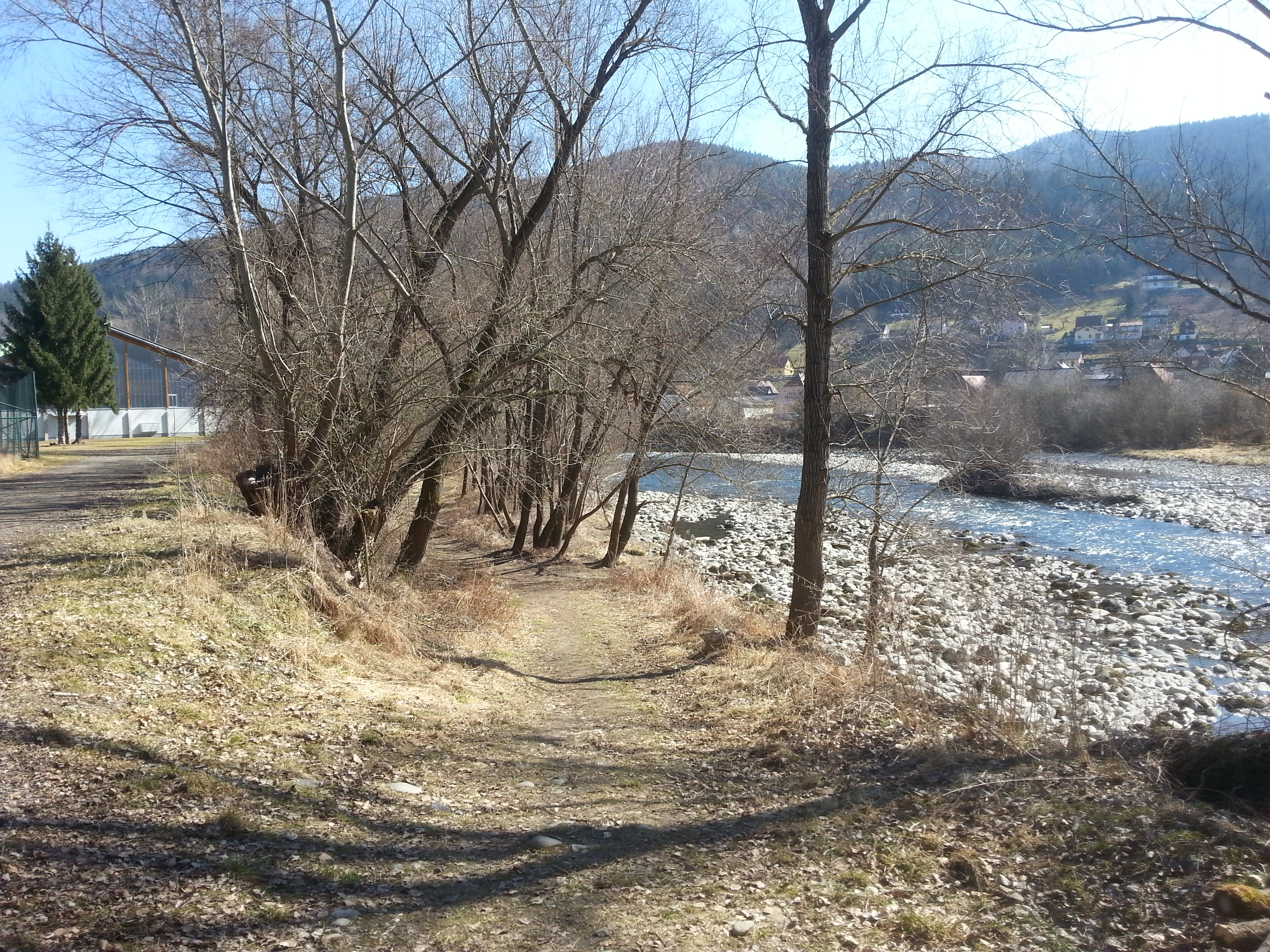 Murufer beim Tennisplatz Bruck an der Mur, Blick nach Süd, mutmaßlicher Standort einer römischen Brücke.